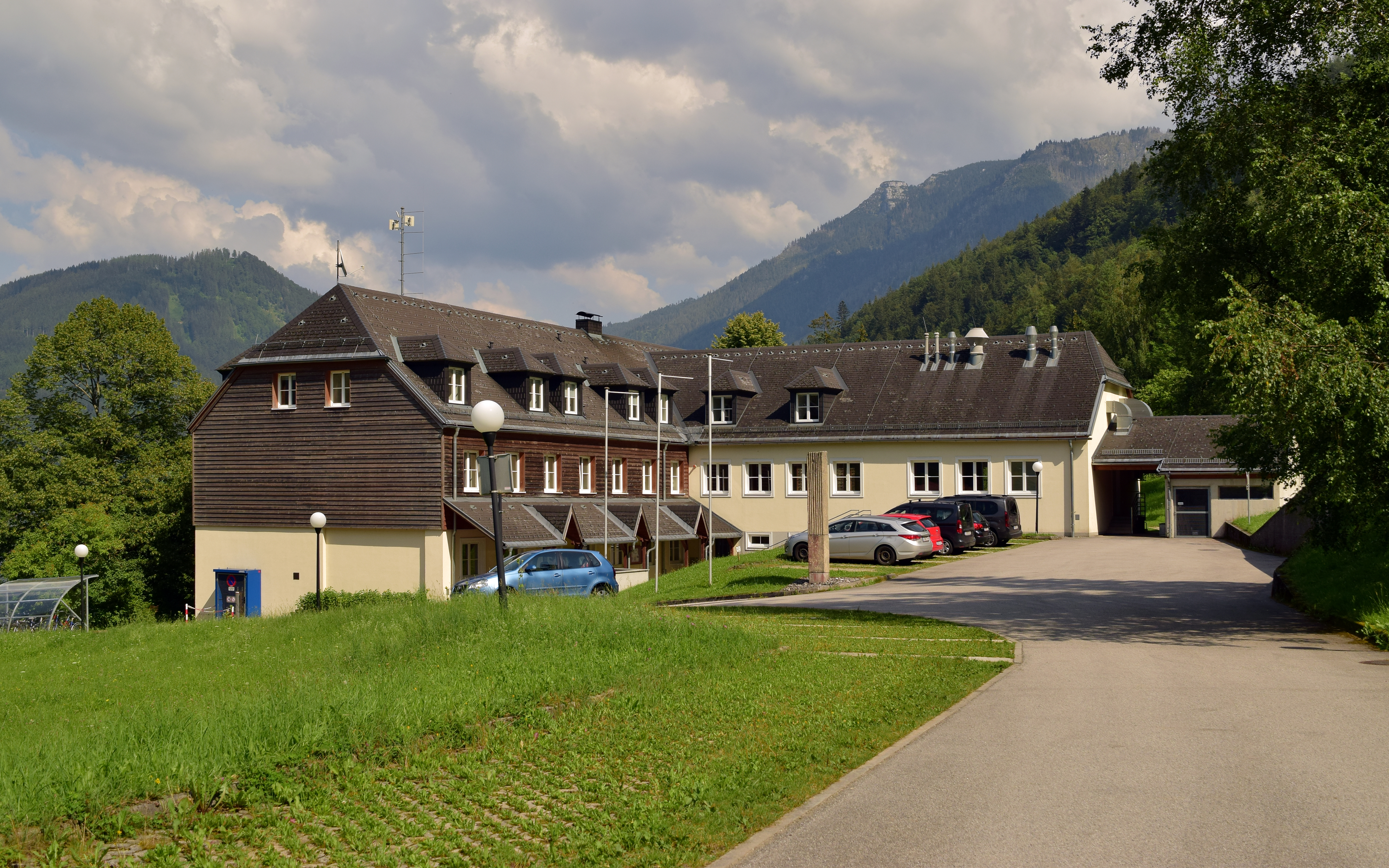 Der WasserCluster Lunz ist eine Forschungseinrichtung, die aus der ehemaligen Biologischen Station Lunz hervorging. Das Gebäude, in dem der WasserCluster untergebracht ist, war während der Nazi-Zeit ein HJ-Ausbildungslager (ohne den mittigen Zubau), siehe dazu die Fotos der Infotafel des Mahnmals. 'Wasser Cluster Lunz' (Q30295542)